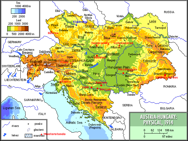 Orte in Verbindung mit der Geschichte des Lipizzaners